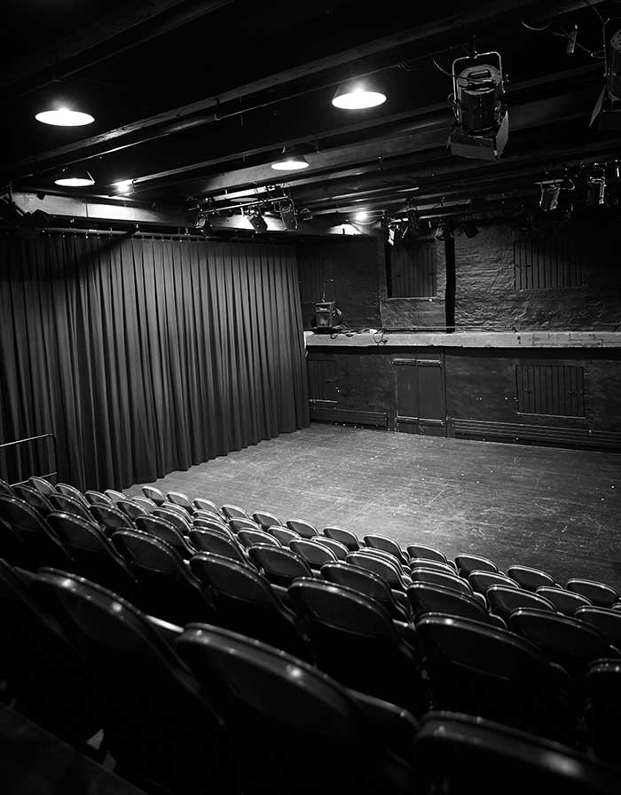 Billede af teatersalen set fra publikumsrækkerne.